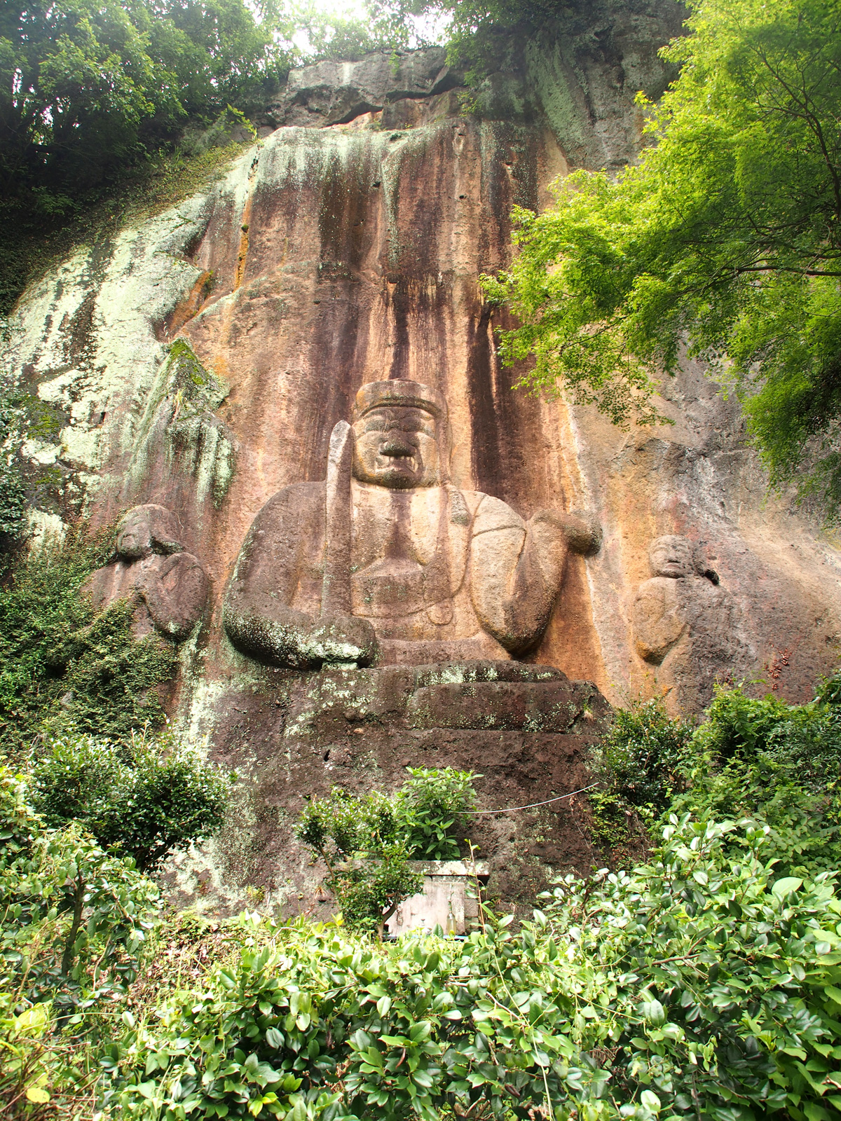 普光寺磨崖仏（大分県豊後大野市）